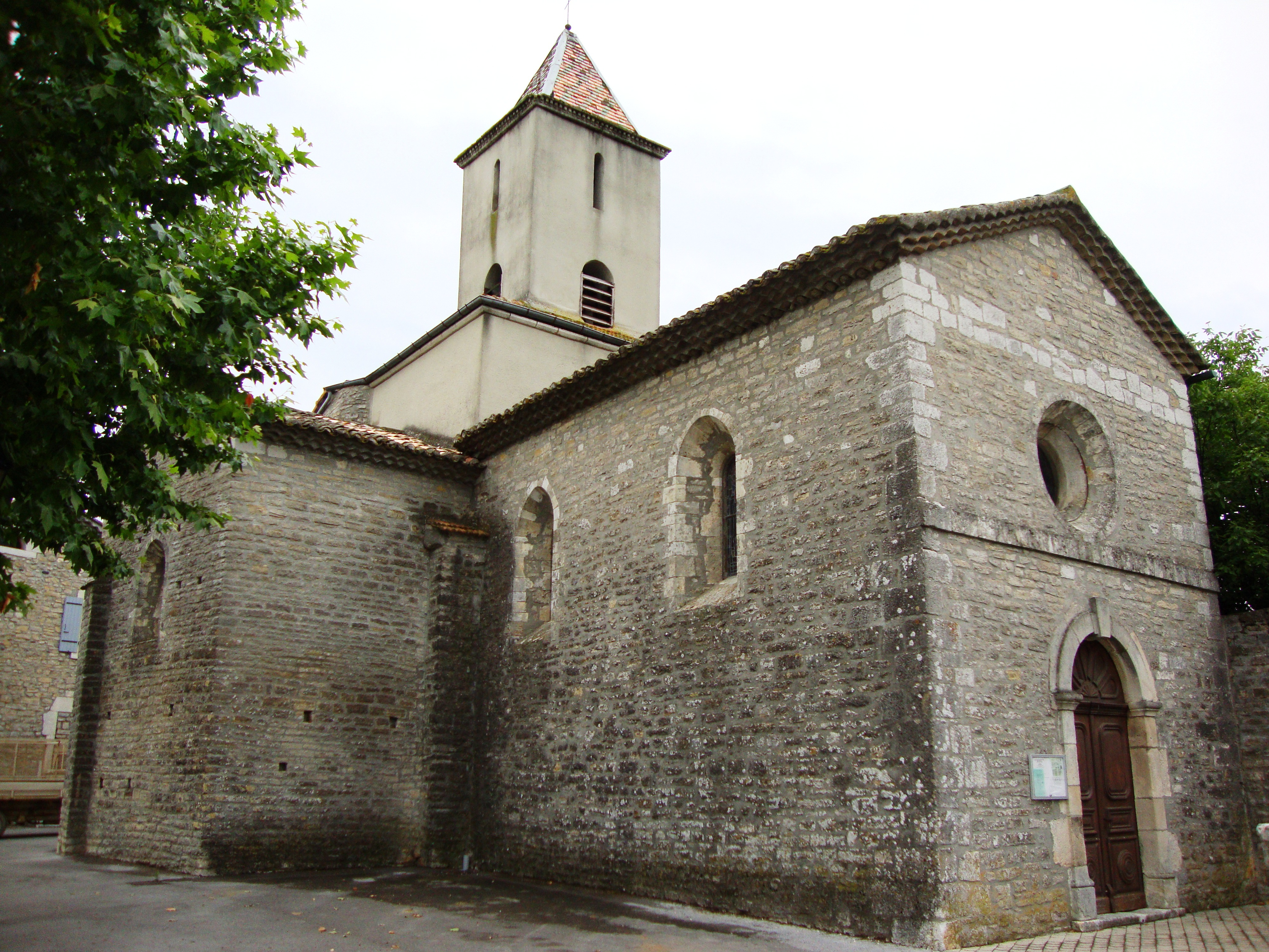 Saint-Maurice-d'Ardèche (Ardèche, Fr) église, côté entrée